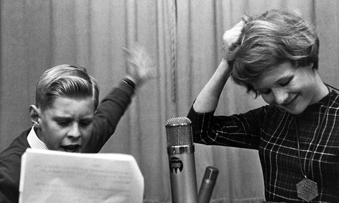 Seppo Hovi juontamassa Yleisradion Lastenradiota 1950-luvulla.